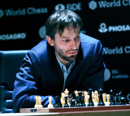 Александр Грищук, Турнир Претендентов 2018